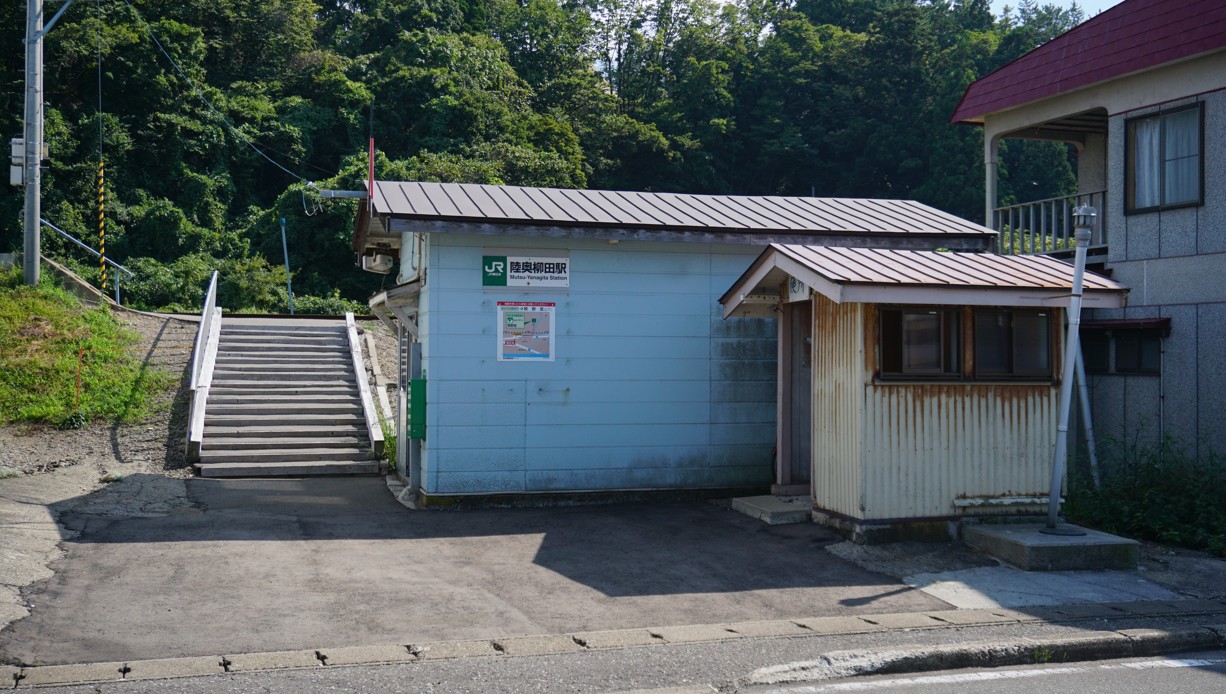 五能線 陸奥柳田駅（青森県西津軽郡深浦町）